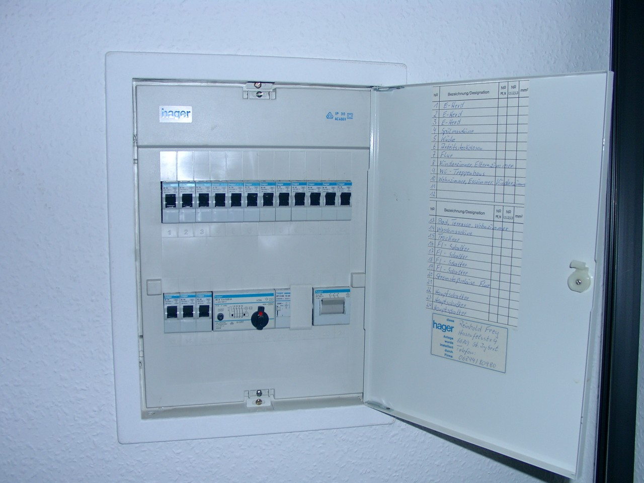 Unterverteilung einer Wohnung